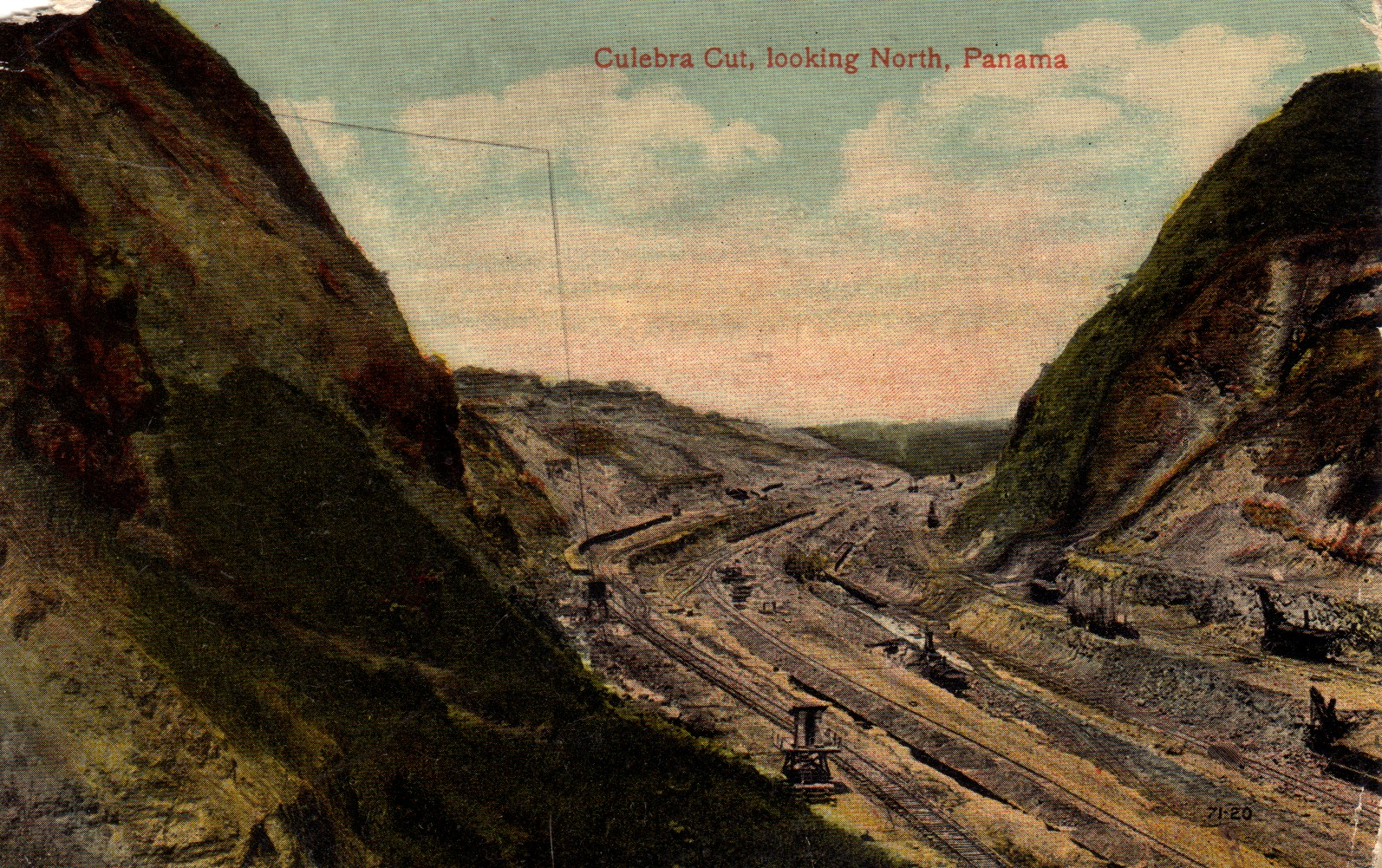 Postal del Canal de Panamá en construcción